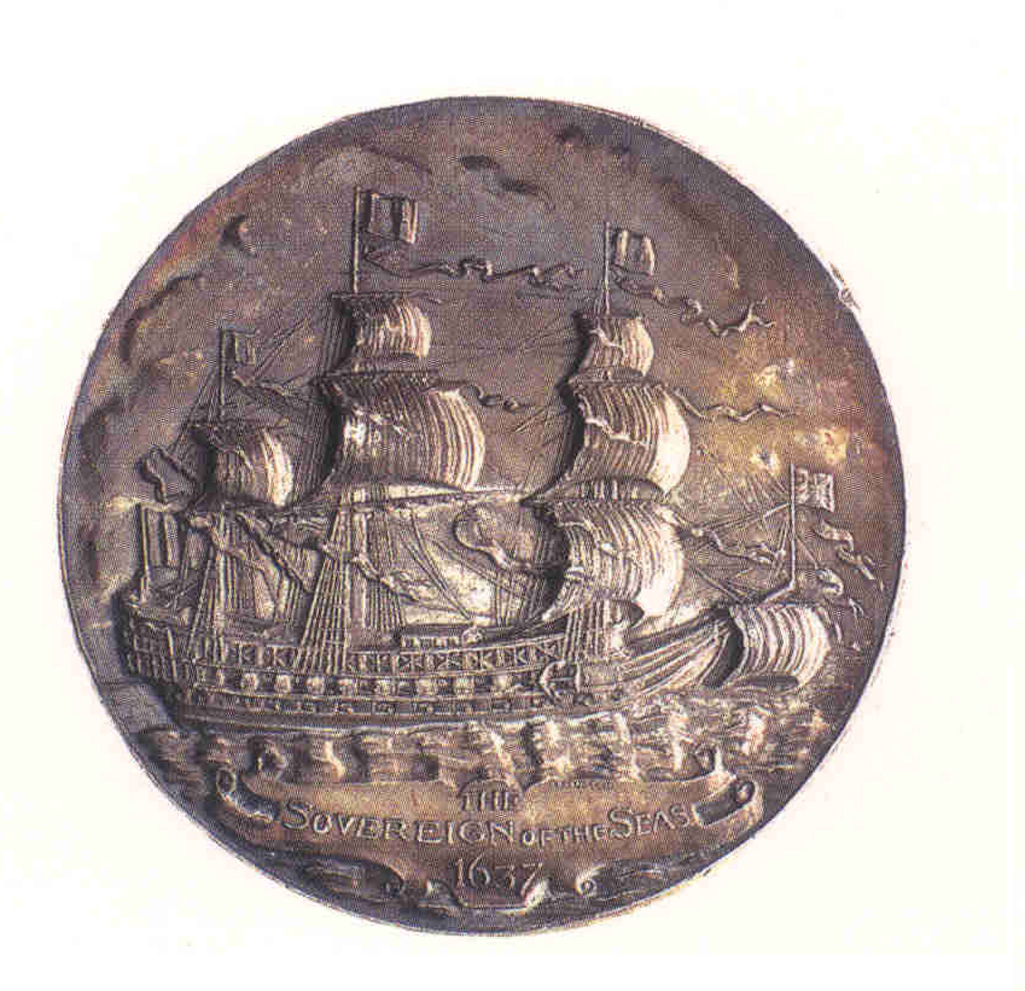 Titulature : Dans un cartouche à l'exergue : The Sovereign of the seas et 1637 dans un cartouche. Le Souverain des mers voguant à gauche, à pleine voile. Commentaire : Cette médaille commémore le premier festival européen de course internationale de Yacht. Yacht est un mot d'origine hollandaise qui signifie pourchasser ou poursuivre. Au départ les Yachts sont des petits navires de guerre très rapides faits pour la Course (chasse des bateaux ennemis). La première régate avait eu lieu en Angleterre en 1661. La discipline est devenu sport olympique aux Jeux de Paris en 1900. En 1907 est créé l'International Yacht Racing Union (IYRU). Le graveur a choisi le plus prestigieux des navires anglais, mais aussi le plus lourd pour illustrer une course de bateaux à voile de Yacht qui sont en général des bâteaux légers et rapides